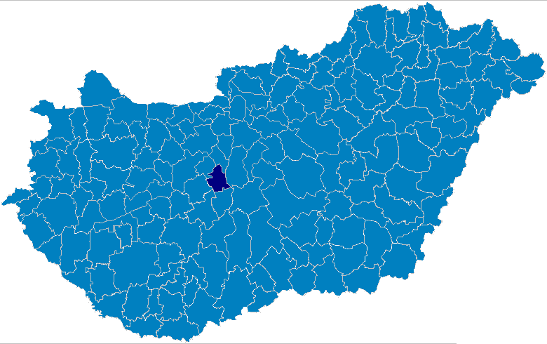 Az Adonyi kistérség elhelyezkedése Magyarország térképén.